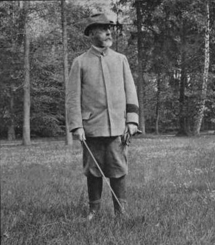 Oberjägermeister von Heintze in Letzlingen, in The Badminton Magazine of Sports & Pastimes 21 (105), S. 369. Anm: Die schwarze Trauerbinde erinnert an seine 1903 verstorbene Ehefrau.